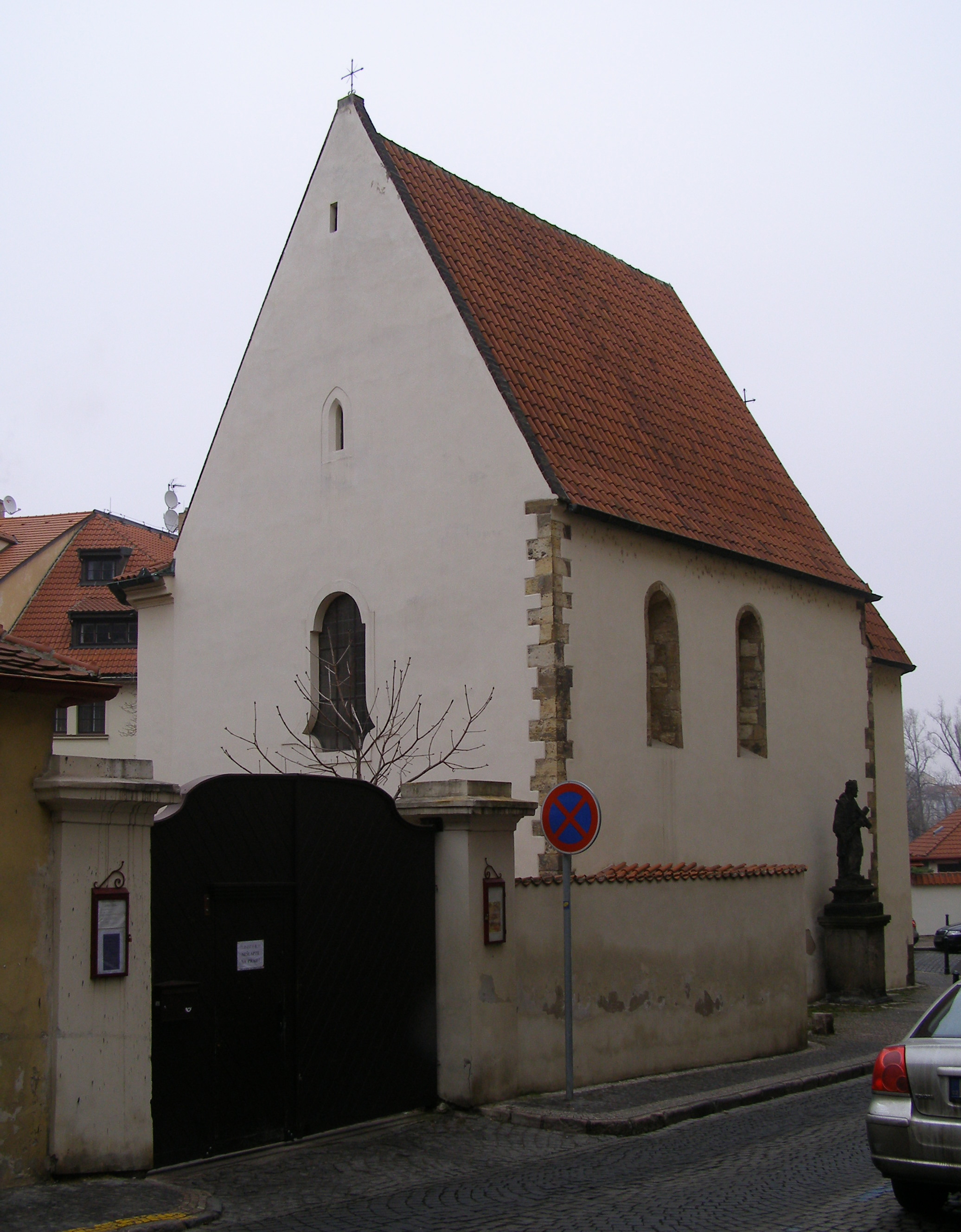 Špitál Malostranský a kostel sv. Jana Křtitele Na Prádle (Malá Strana), Praha 1, Říční, Všehrdova, Besední 440/6, Malá Strana